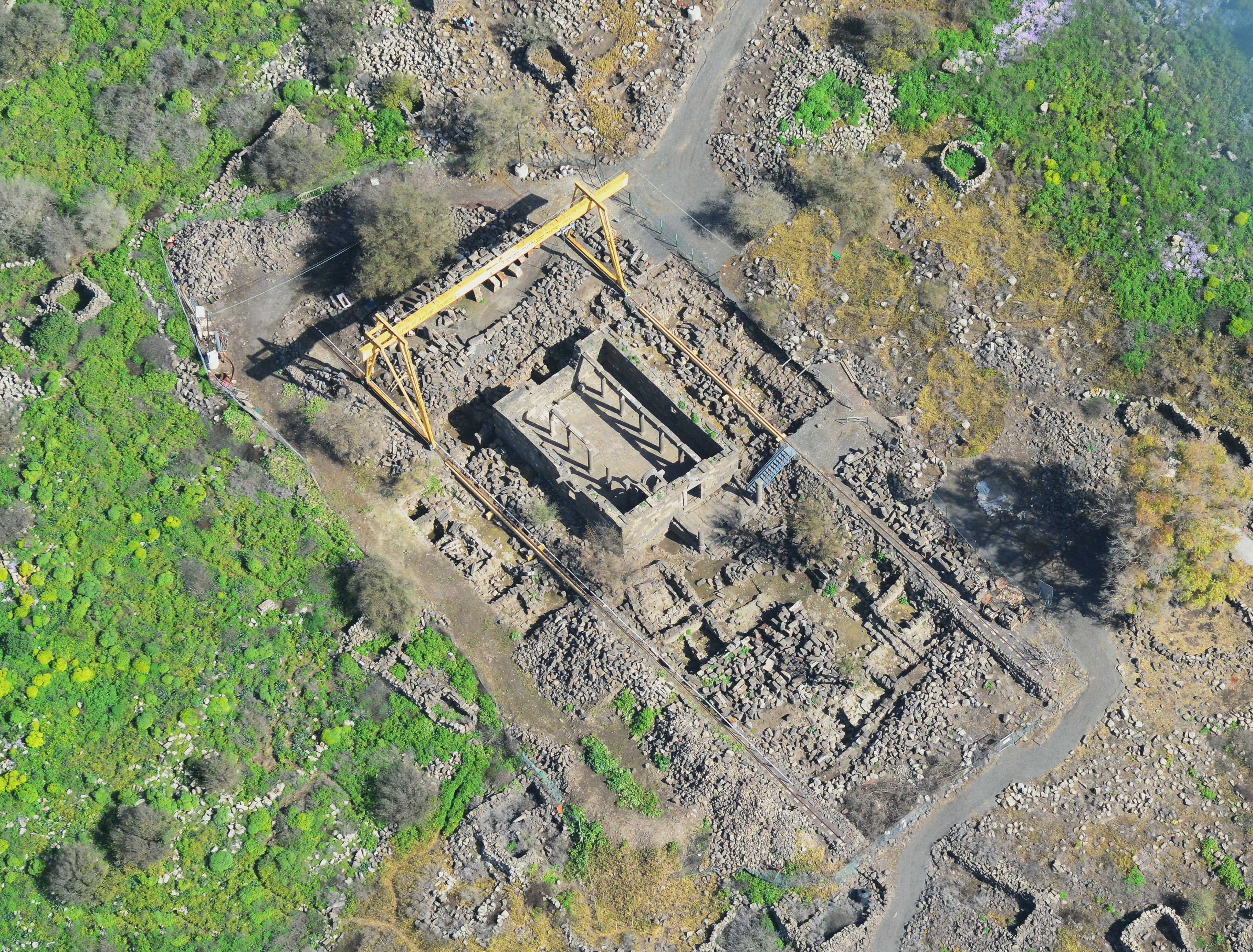 בית הכנסת העתיק באום אל-קנאטר הוא בית כנסת עתיק מתקופת המשנה והתלמוד שנחשף בדרום רמת הגולן באתר אום אל-קנאטר סמוך למושב נטור. בית הכנסת העתיק הוא מהמפוארים והחשובים מתקופה זו שנמצאו בארץ ישראל. האתר נקרא "קשתות רחבעם" על שם רחבעם זאבי שכיהן כשר התיירות כשאישר את תקציב החפירות בבית הכנסת ונרצח ימים ספורים לאחר מכן.